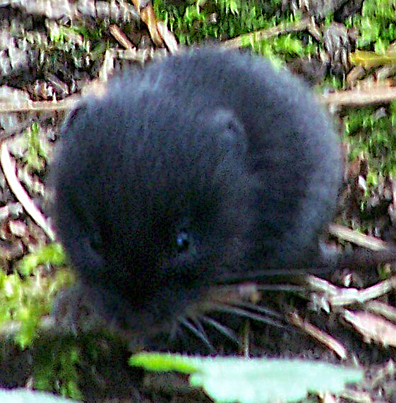 juvenile bank vole, Myodes glareoulus; Germany, Cologne